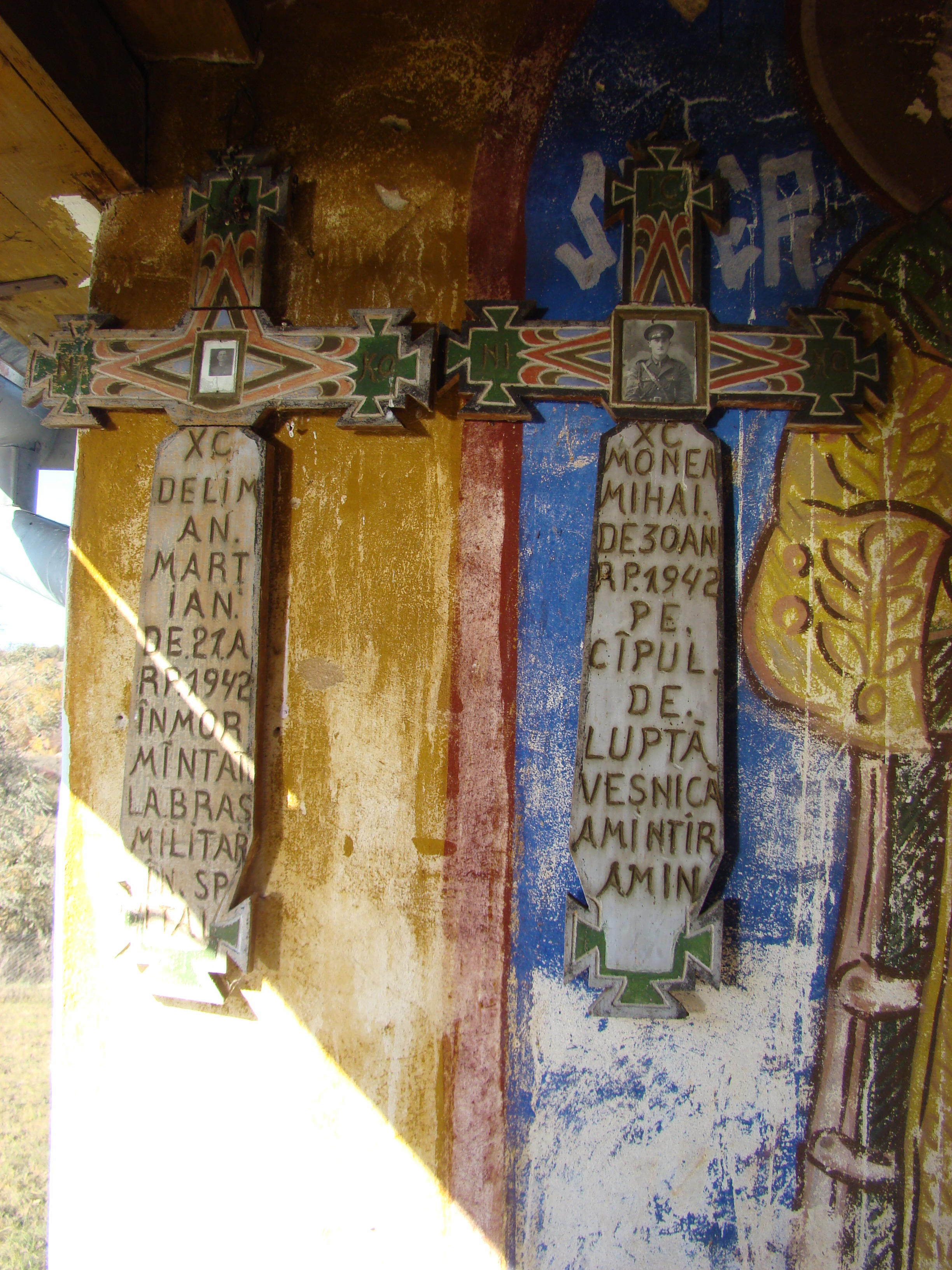 Biserica de lemn „Sființii Arhangheli Mihail şi Gavriil" din Colești, județul Bihor